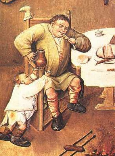 (Poruguese) Detalhe do quadro Os Sete Pecados Capitais (Bosch): gula